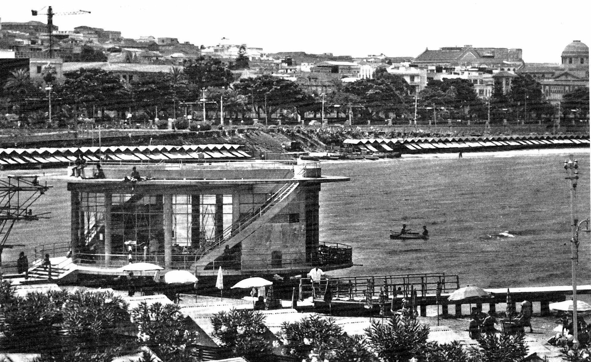 old postcard of Reggio Calabria